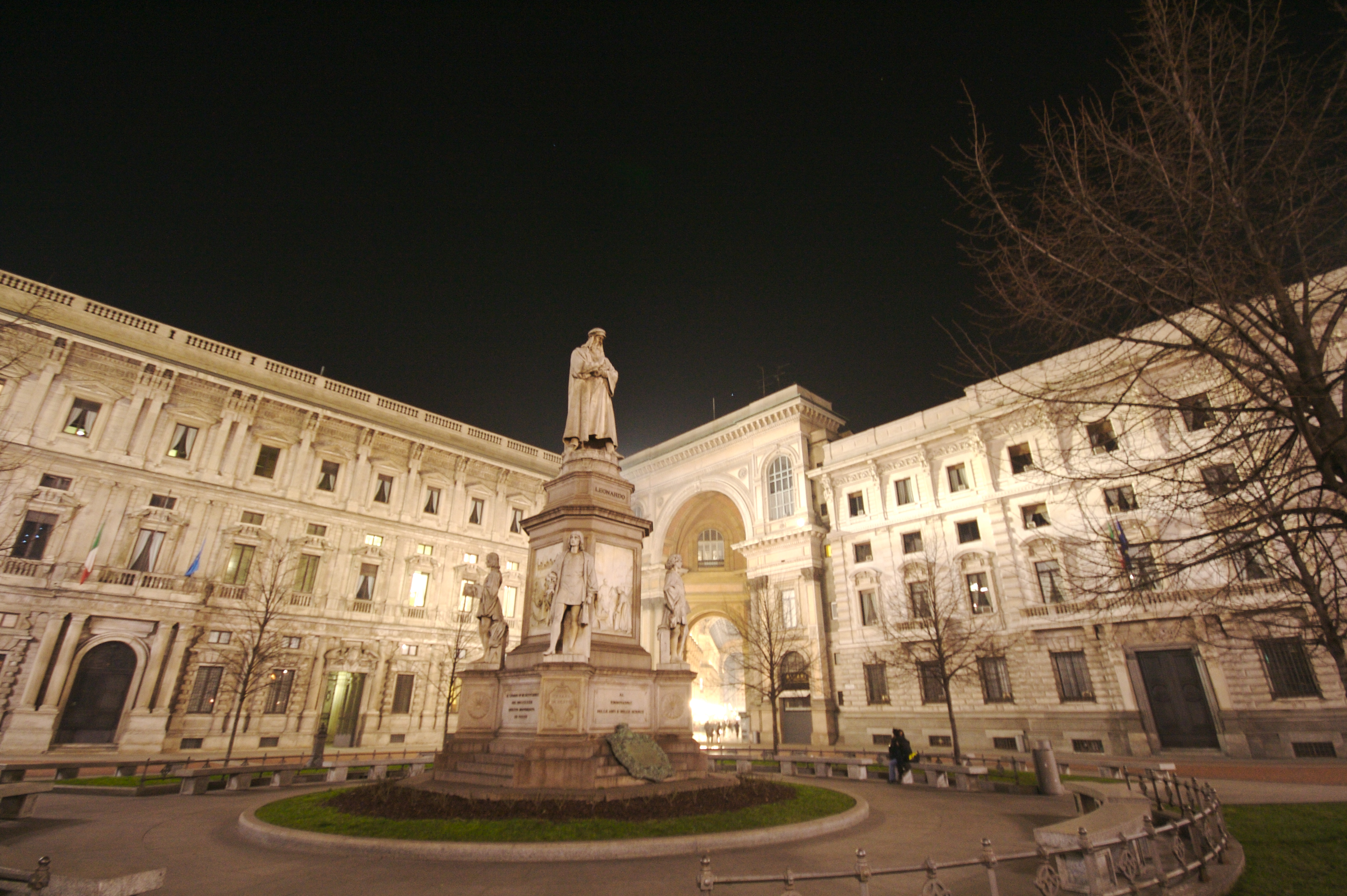 Leonardo in the piazza della Scala, Marino Palace municipality Gallery Vittorio Emanuele II